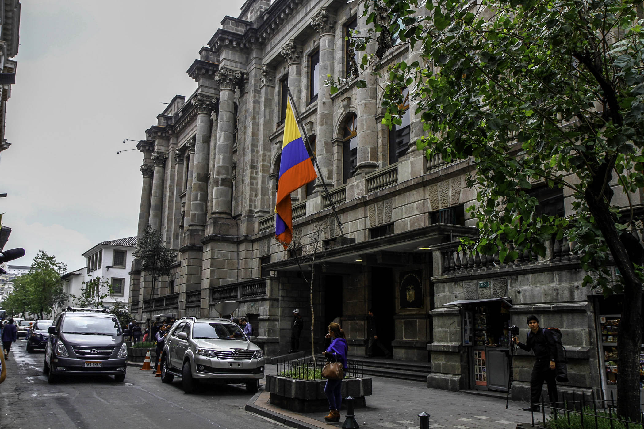 Quito, 25 de mayo (Andes).- Fachada de la Vicepresidencia de la República del Ecuador ubicada en la calle Sebastián de Benalcázar, Centro Histórico de Quito. ANDES/Micaela Ayala V.